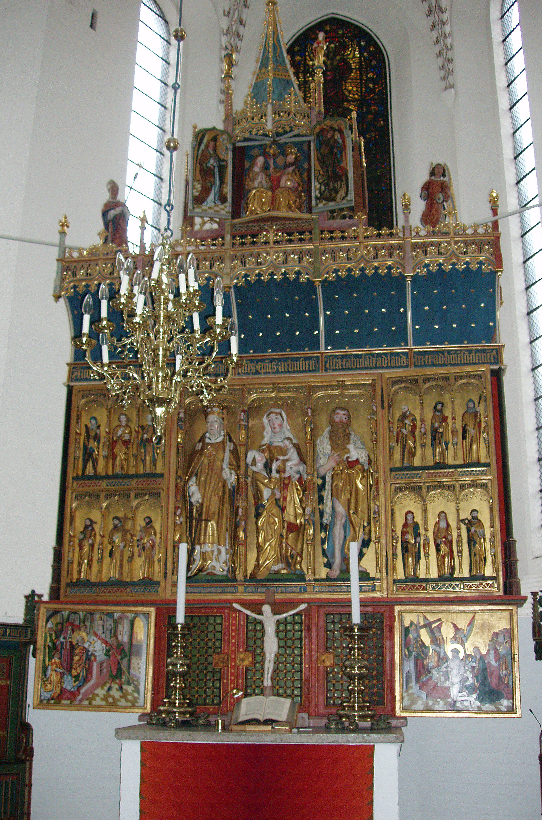 Festsiden af Bernt Notkes altertavle i Århus Domkirke